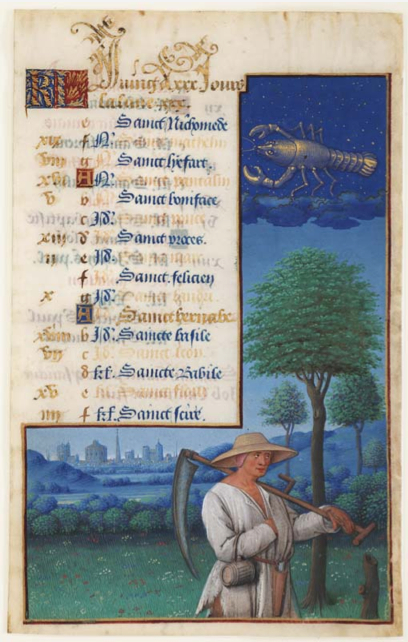 Heures Louis XII Calendrier-Juin